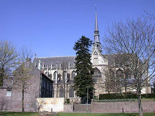 Church "Sacrament" in Meerssen